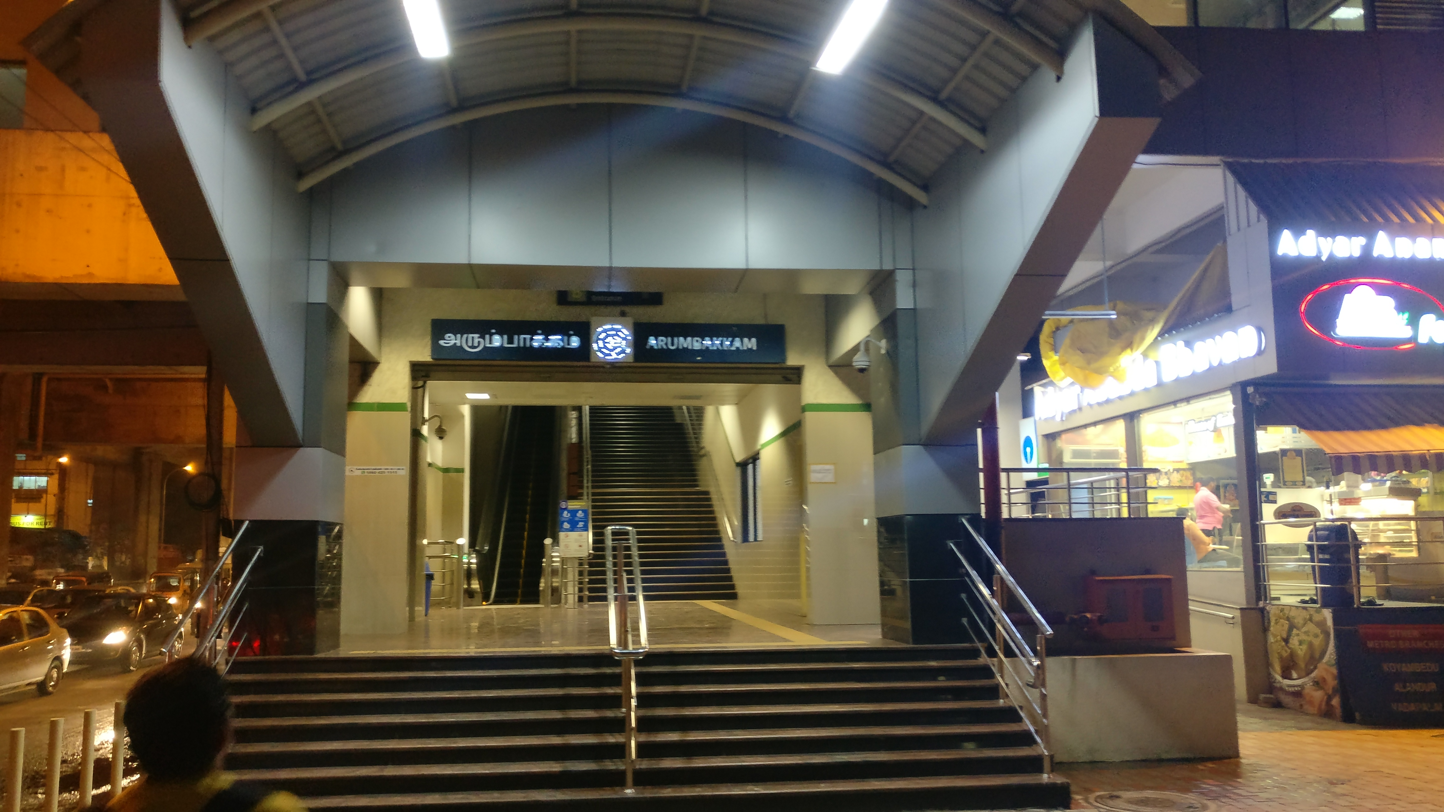 arumbakkam metro station, Chennai